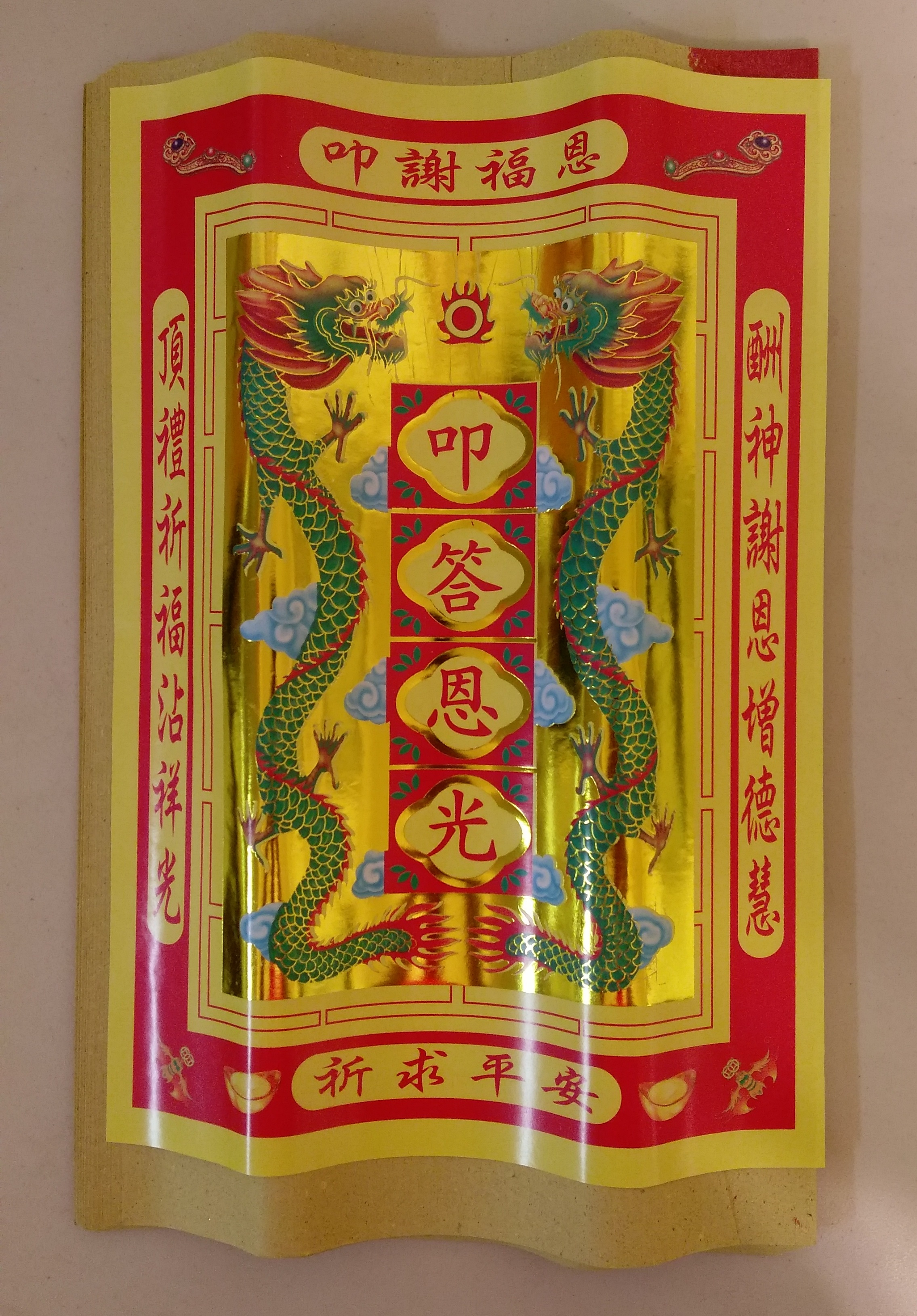 中文（台灣）: 大百天金為最高階金紙